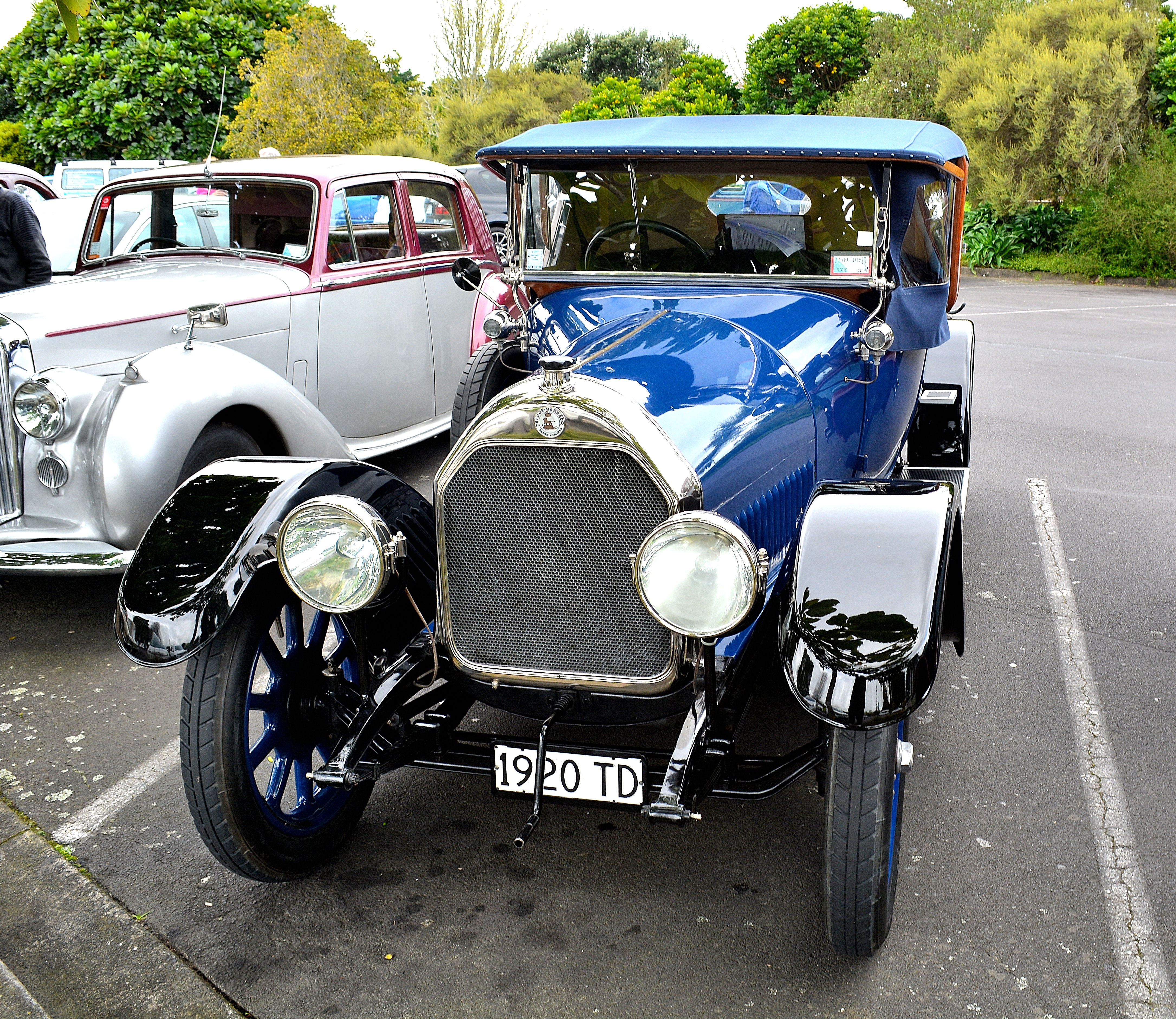 1920 Talbot-Darracq V20